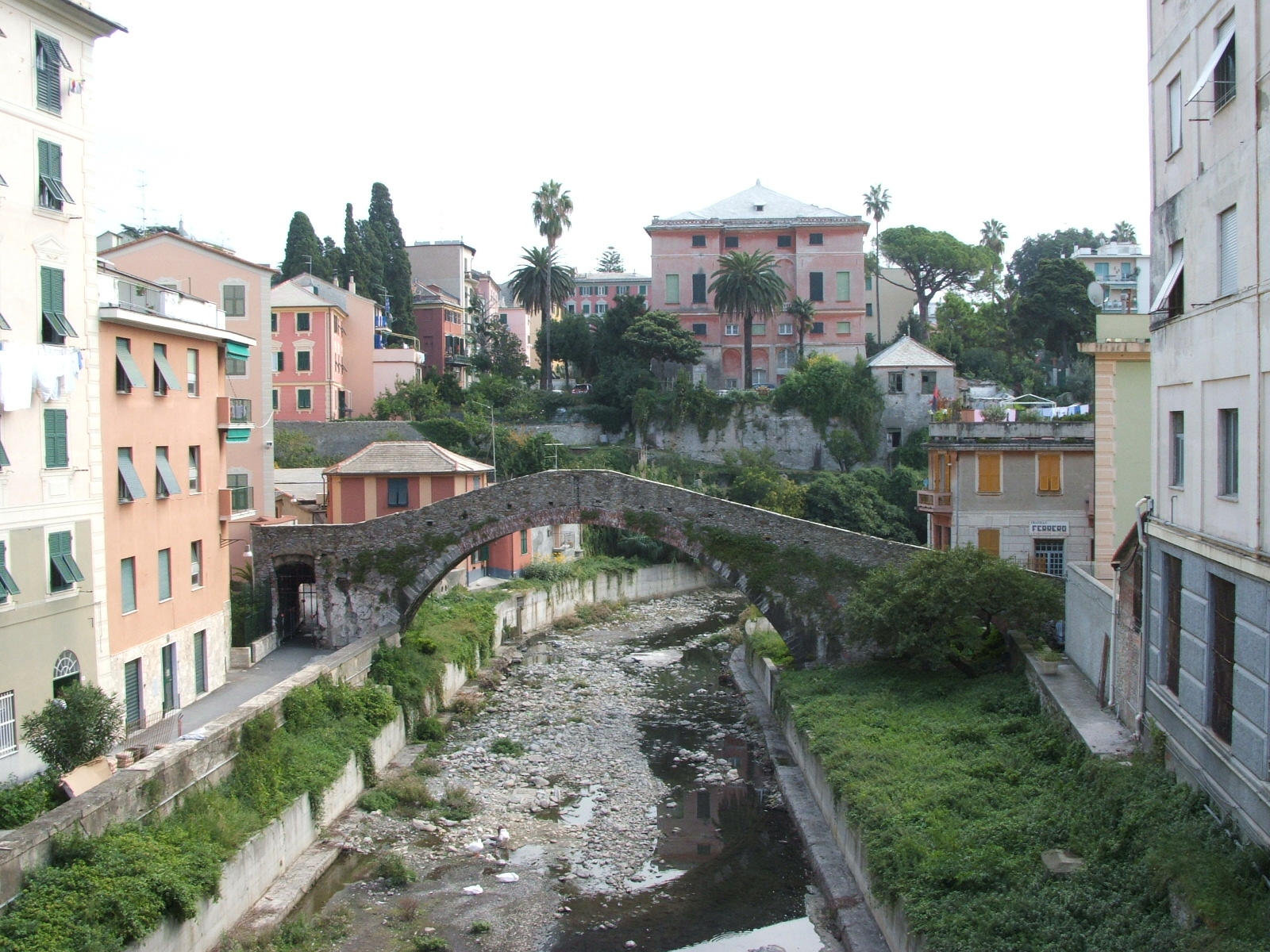 Immagine dalla città di Genova Nervi, antico ponte sul torrente